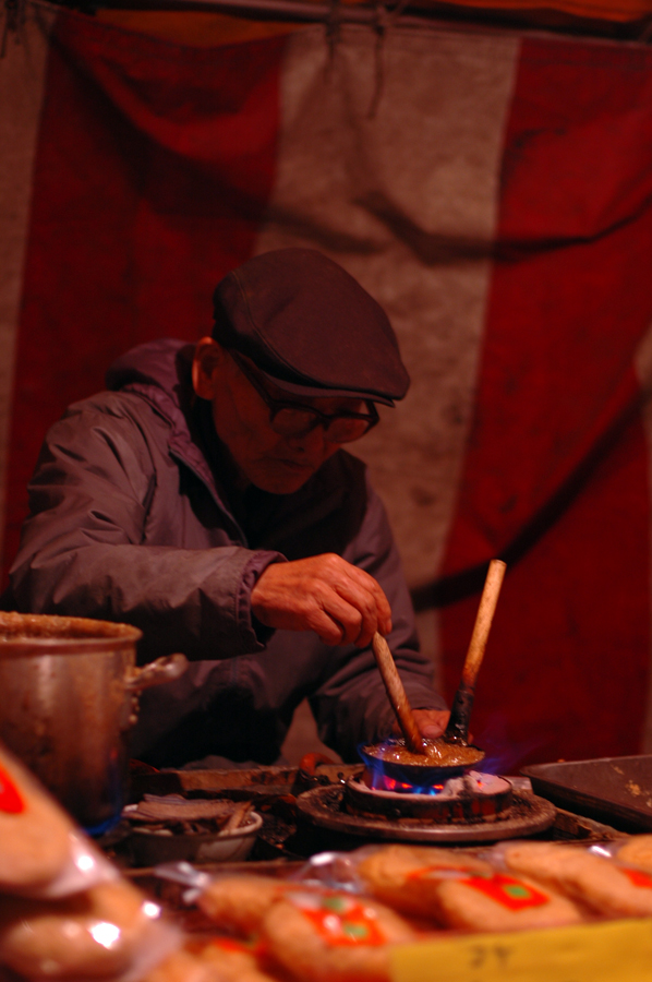 At Asakusa-SensojiHe bakes cookie that is called"karume-yaki"He let me challenge bake it!浅草浅草寺の“かるめ焼き”屋さん僕もチャレンジさせていただきました..。Out door stall / 露店 at Asakusa